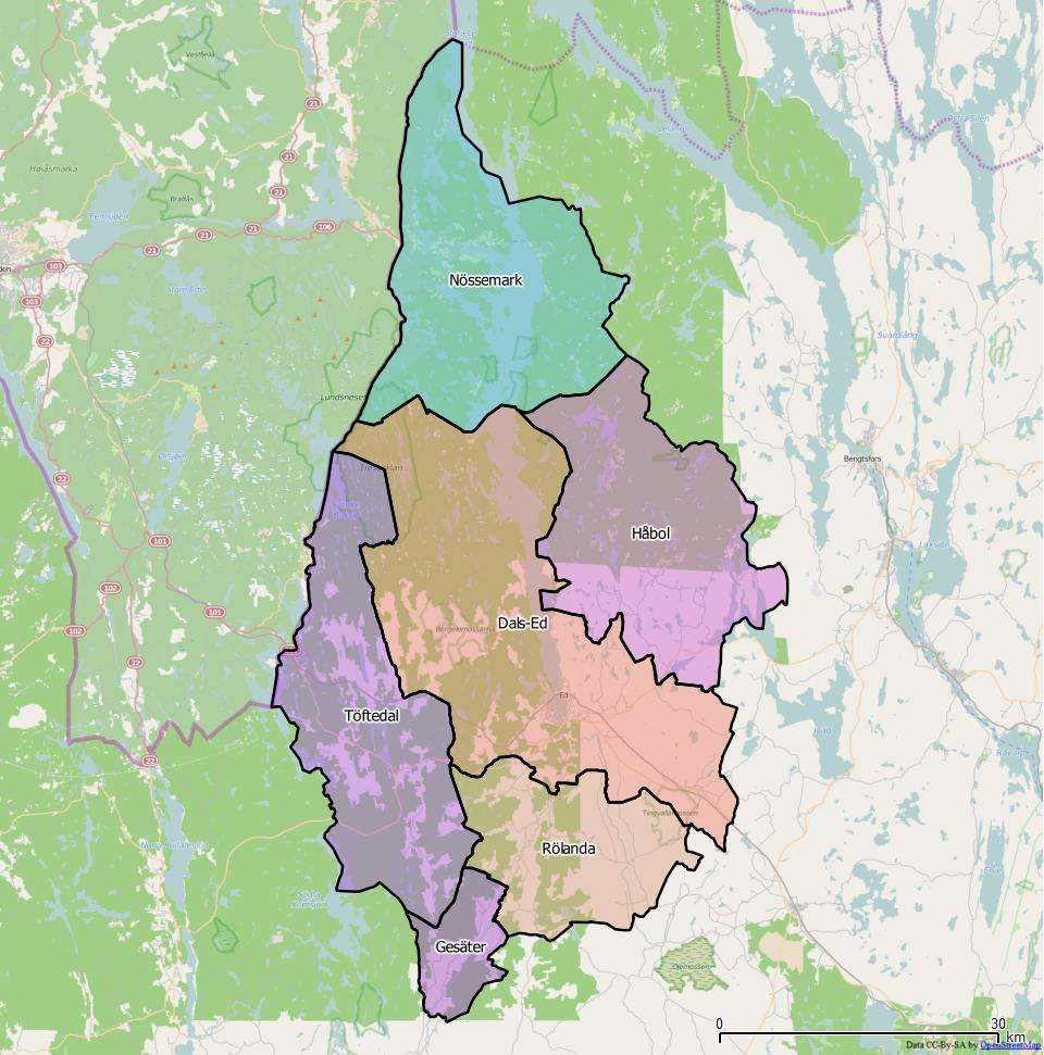 Distriktsindelningen i Dals-Eds kommun